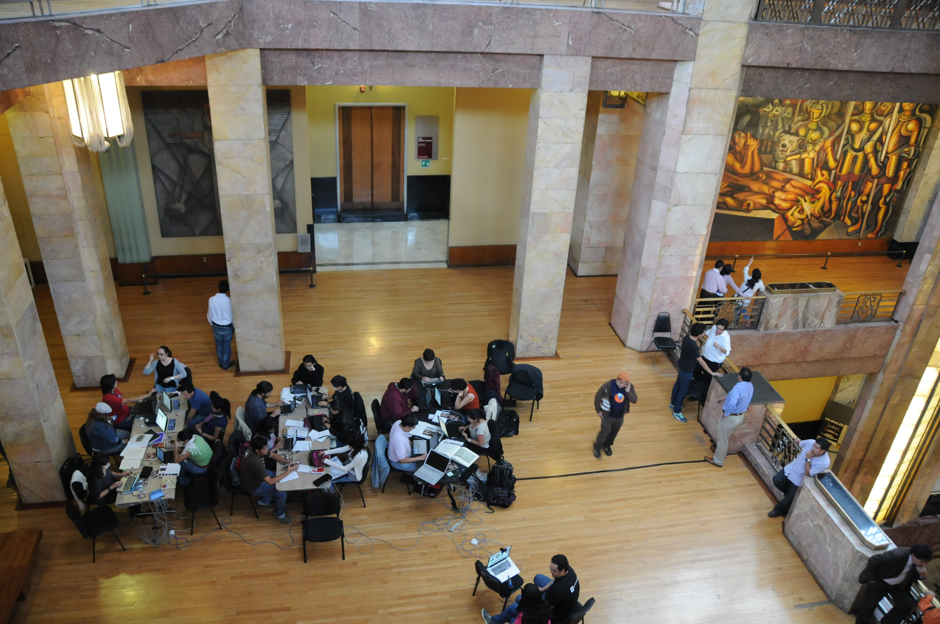 Maratón de edición en el Museo del Palacio de Bellas Artes de la Ciudad de México, 22 de septiembre de 2012.